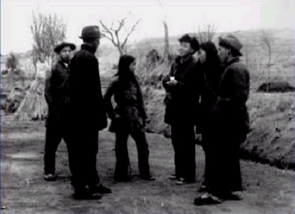 1946年3月，新华社山东总分社胶东分社记者孔迈采访海阳县著名的“五虎村”民兵英雄于化虎、孙玉敏等人。 根据中华人民共和国著作权法，这张照片已过版权保护期限。 来源：